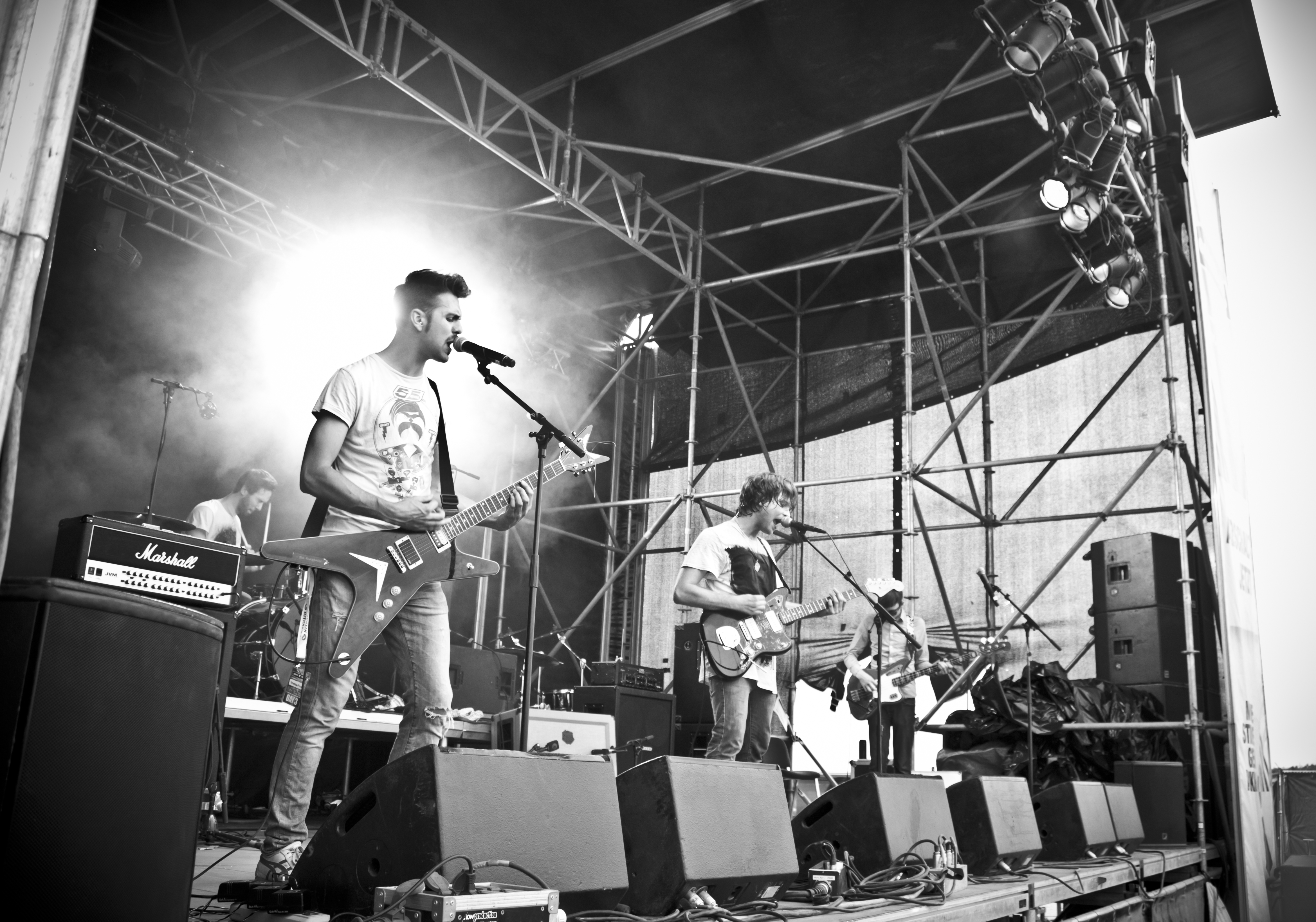 Stereoface @ Nova Rock - Bühne "Abschalten jetzt!"